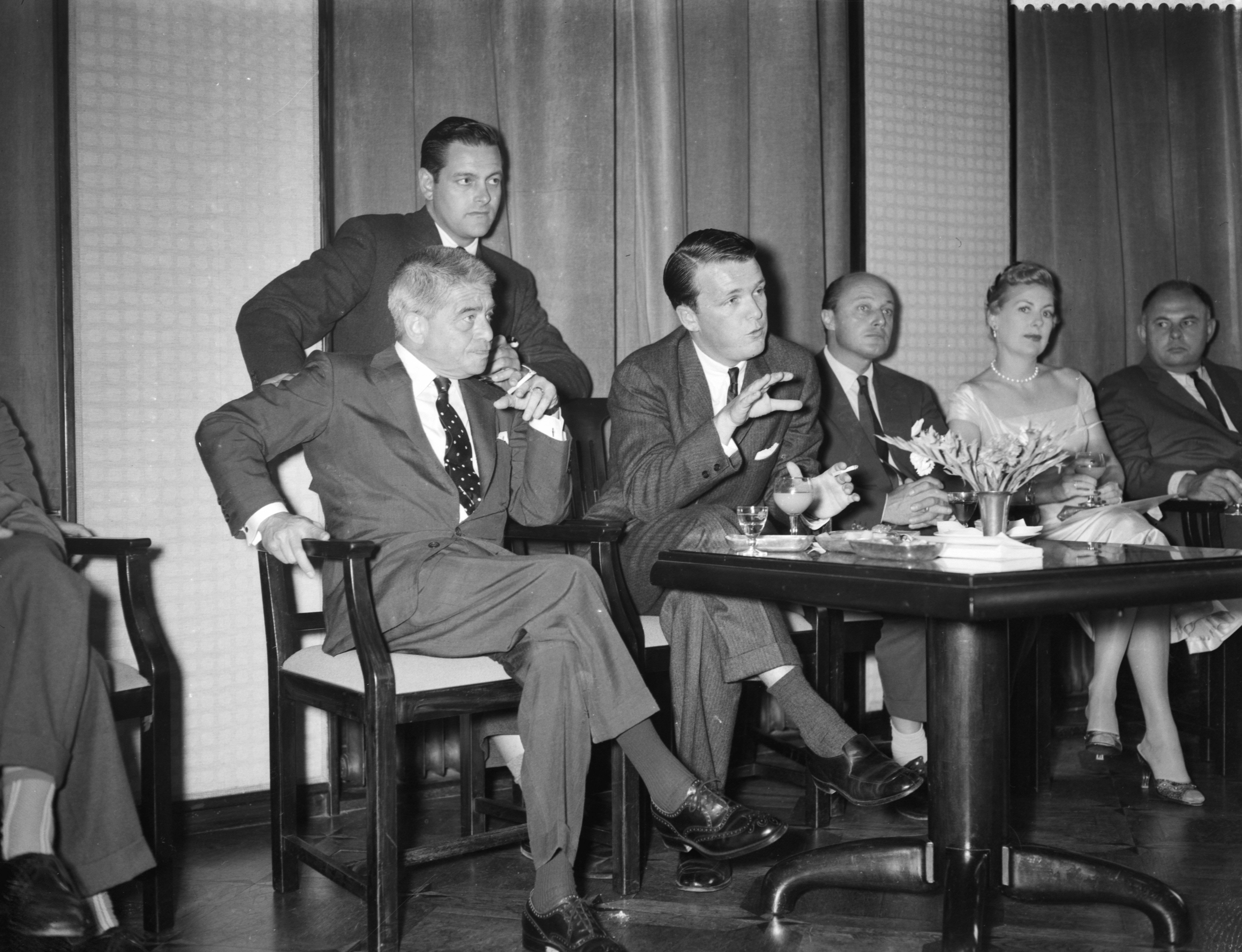 Collectie / Archief : Fotocollectie Anefo Reportage / Serie : [ onbekend ] Beschrijving : Persconferentie i.v.m. "Anne Frankfilm" in het Amstelhotel te Amsterdam, v.l.n.r.: Alfred Newman (museumdirecteur), George Stevens (ass producer) , $ Datum : 14 juli 1958 Locatie : Amsterdam, Noord-Holland Trefwoorden : persconferenties Instellingsnaam : Amstelhotel Fotograaf : Rossem, Wim van / Anefo Auteursrechthebbende : Nationaal Archief Materiaalsoort : Negatief (zwart/wit) Nummer archiefinventaris : bekijk toegang 2.24.01.04 Bestanddeelnummer : 909-7117 Reacties Geplaatst door Maaike op 15 januari 2013 - 17:17. Film naar het Dagboek van Anne Frank. Trefwoorden: Dagboek van Anne Frank Instellingsnamen: 20th Century Fox Filmmaatschappij